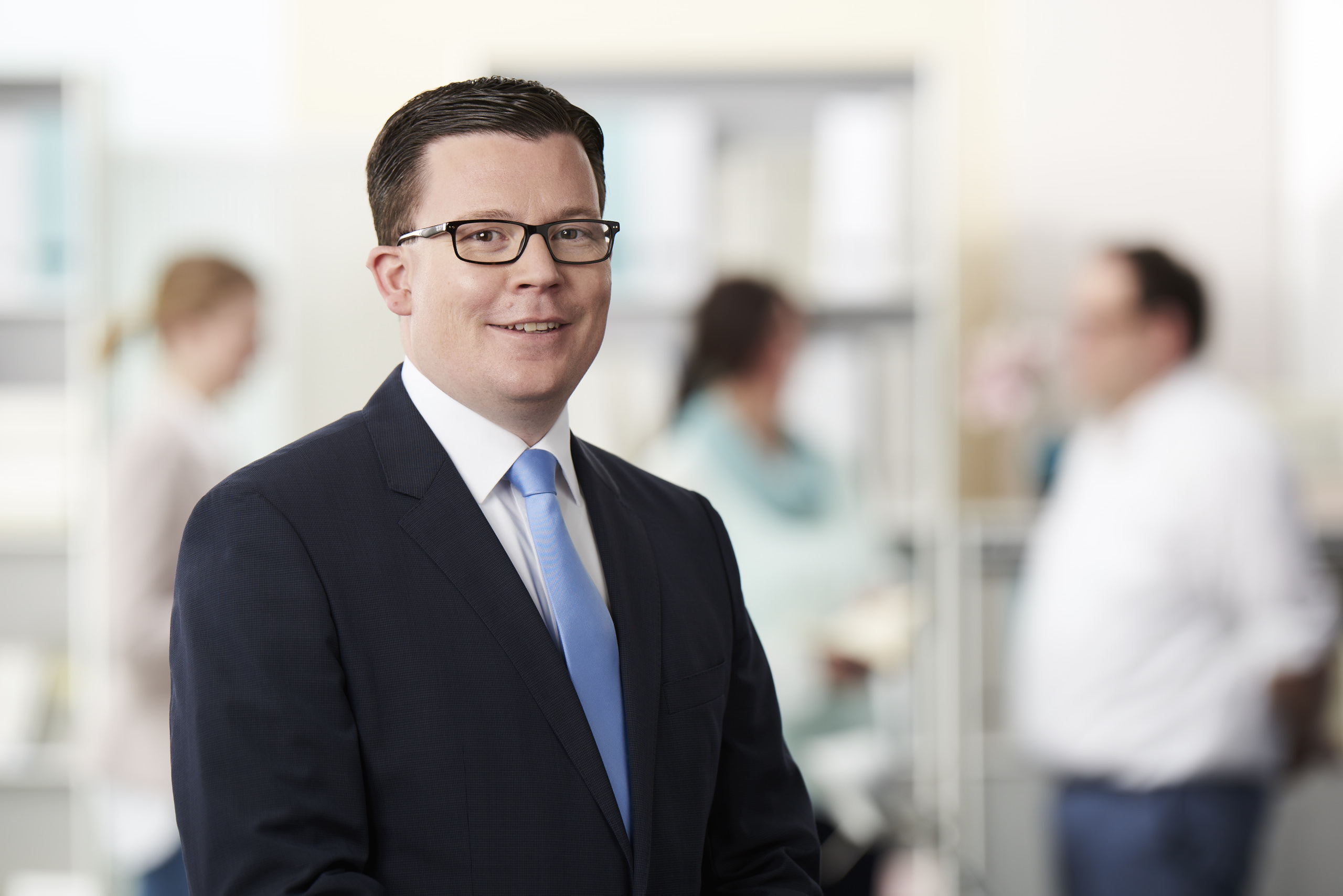 Portraitfoto Torbjörn Kartes MdB